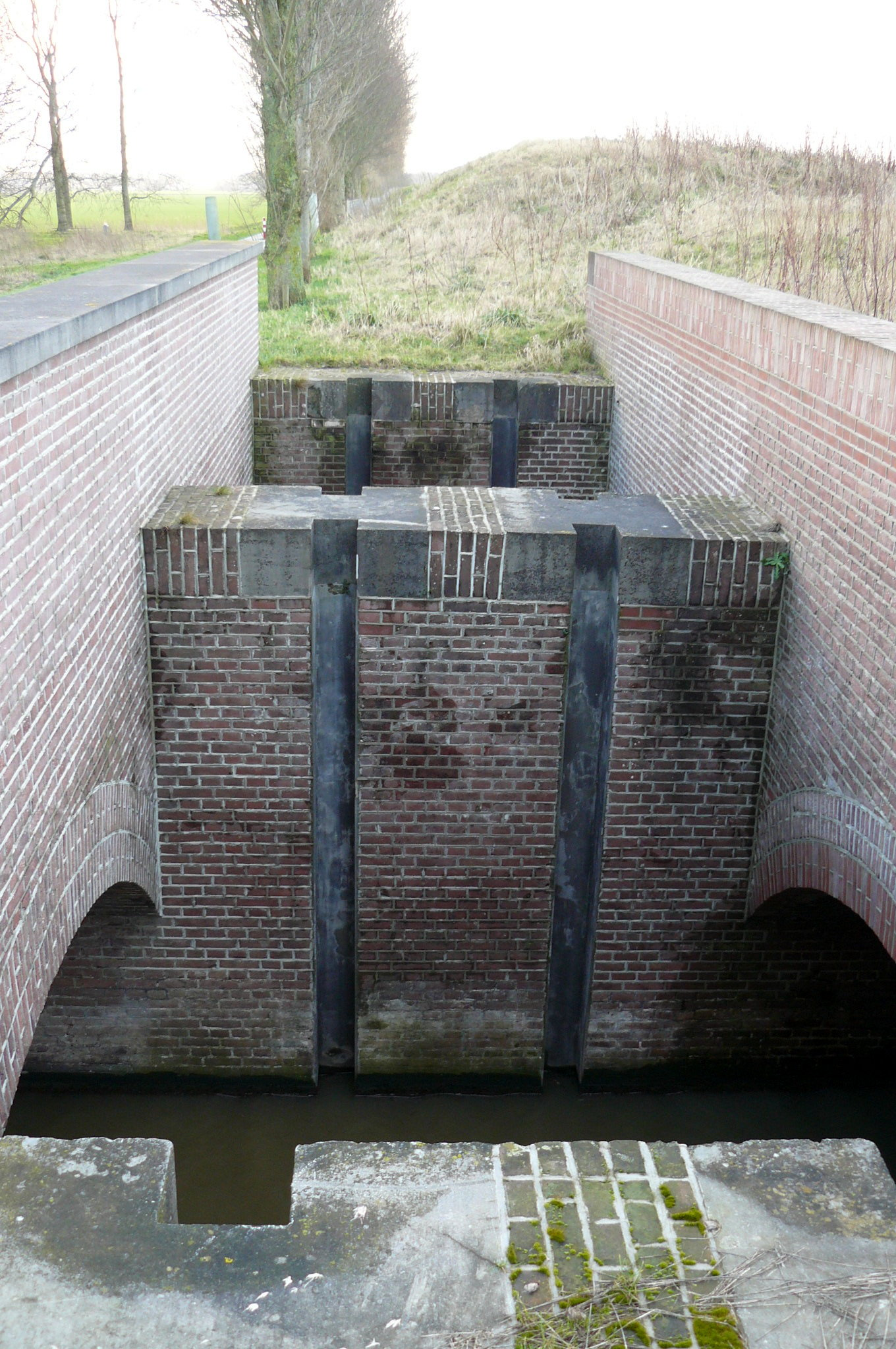 Damsluis in de Molentocht, onderdeel van de Liniewal Aagtendijk-Zuidwijkermeer. In de sleuven werden de schotbalken geplaatst en tussen de twee rijen schotbalken werd zand gestort ter versteviging en om het geheel waterdicht te krijgen.